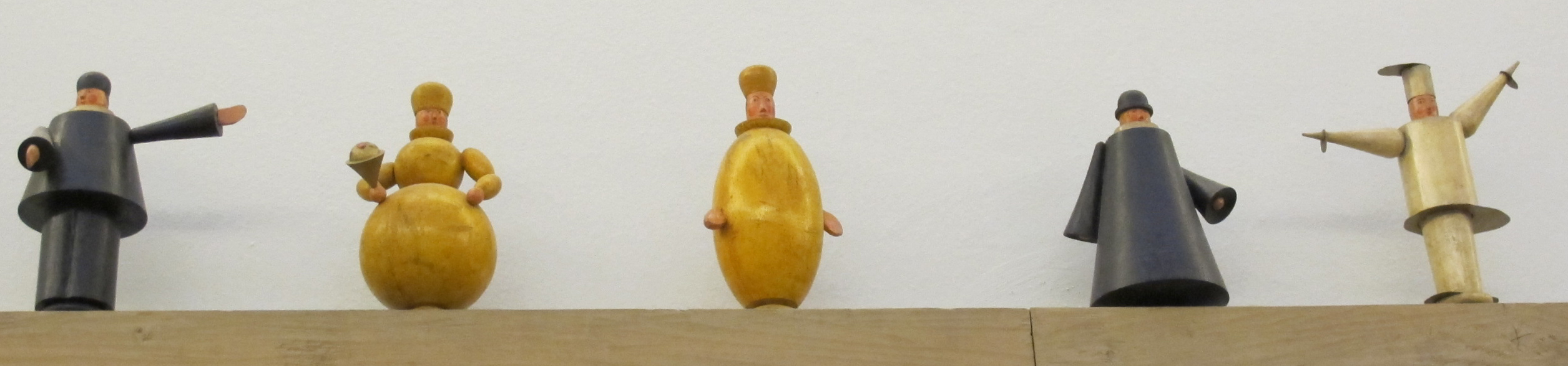 Eberhardt schrammen, 1923 ca